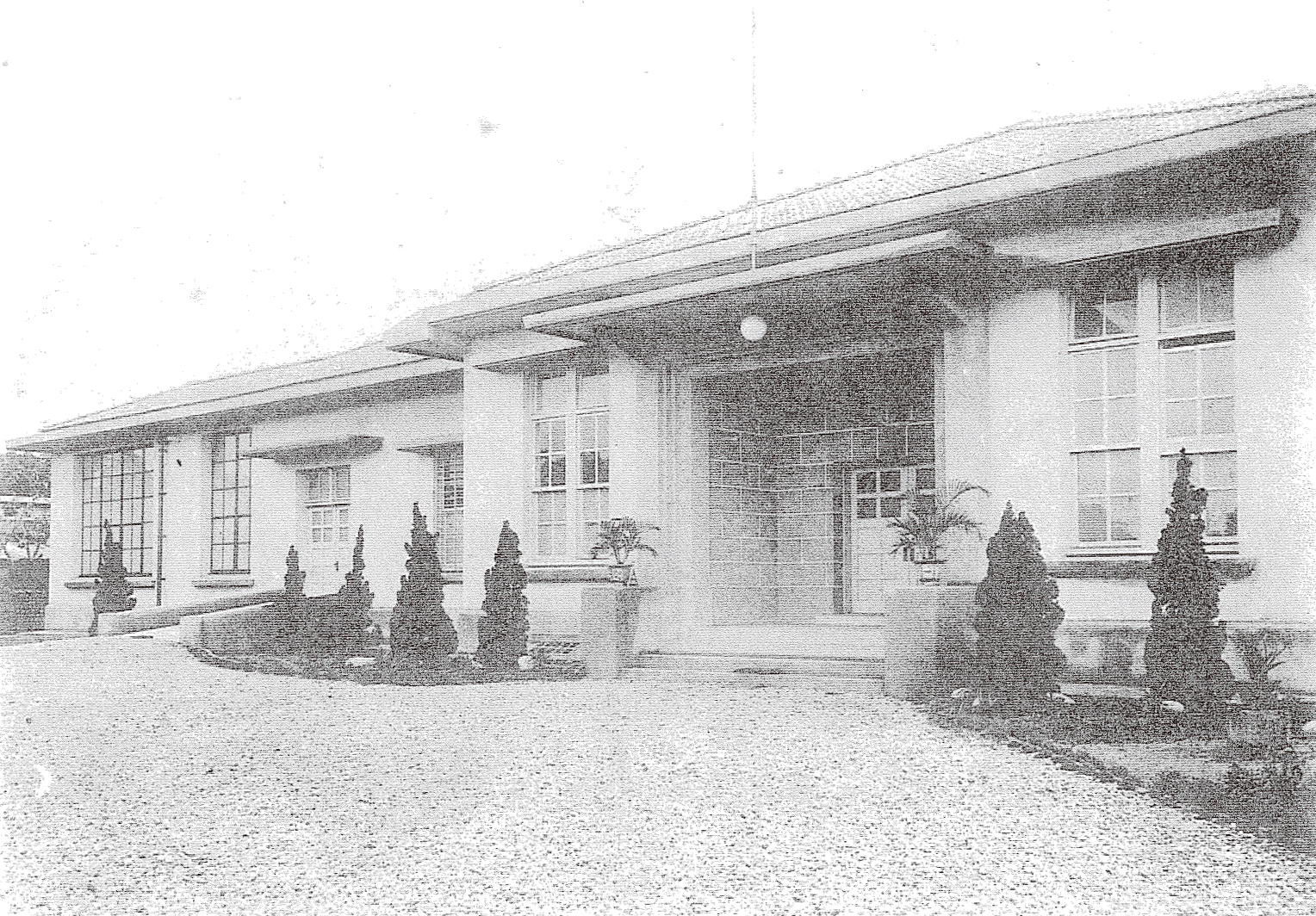 中文（台灣）: 臺中衞戍病院正面